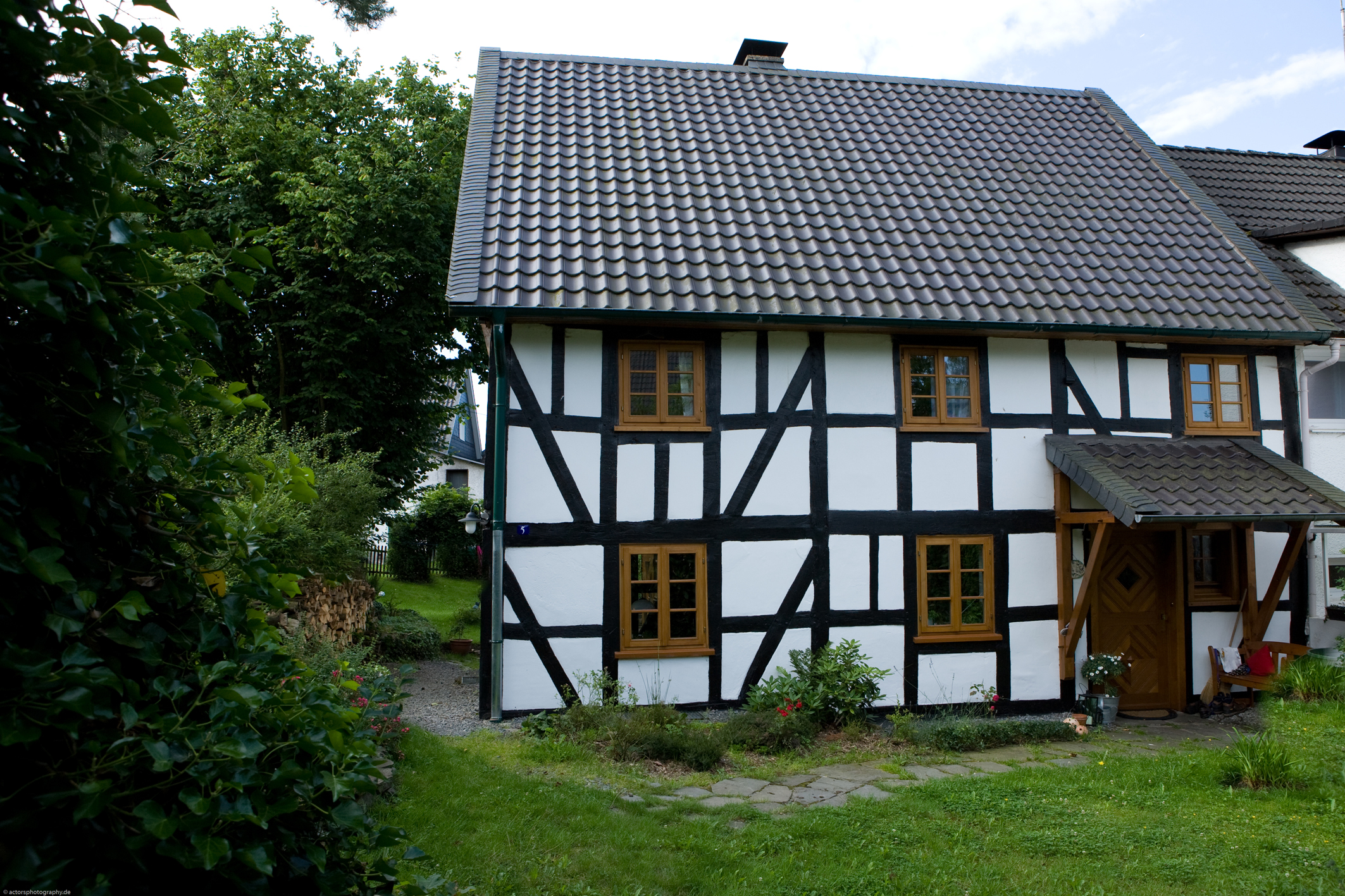 Fachwerkhaus im Oberbergischen D-51580 Reichshof-Heischeid, gebaut um ca. 1780. Das zweitälteste Haus im Ortsteil Heischeid, soweit bekannt.